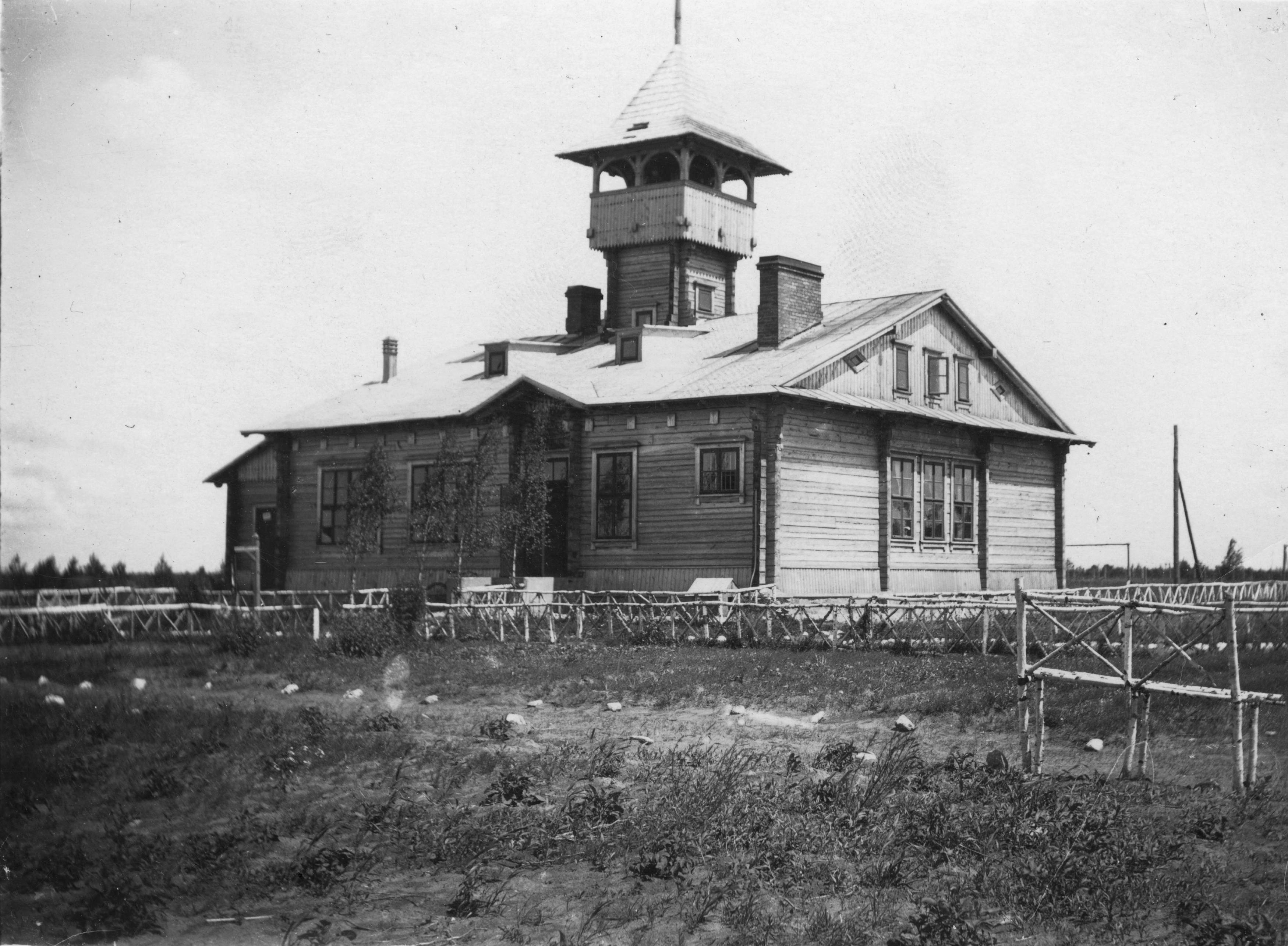 Беларуская (тарашкевіца): Падсьвільле (Padśville), Каменны Воз (Kamienny Voz). Стражніца КАП